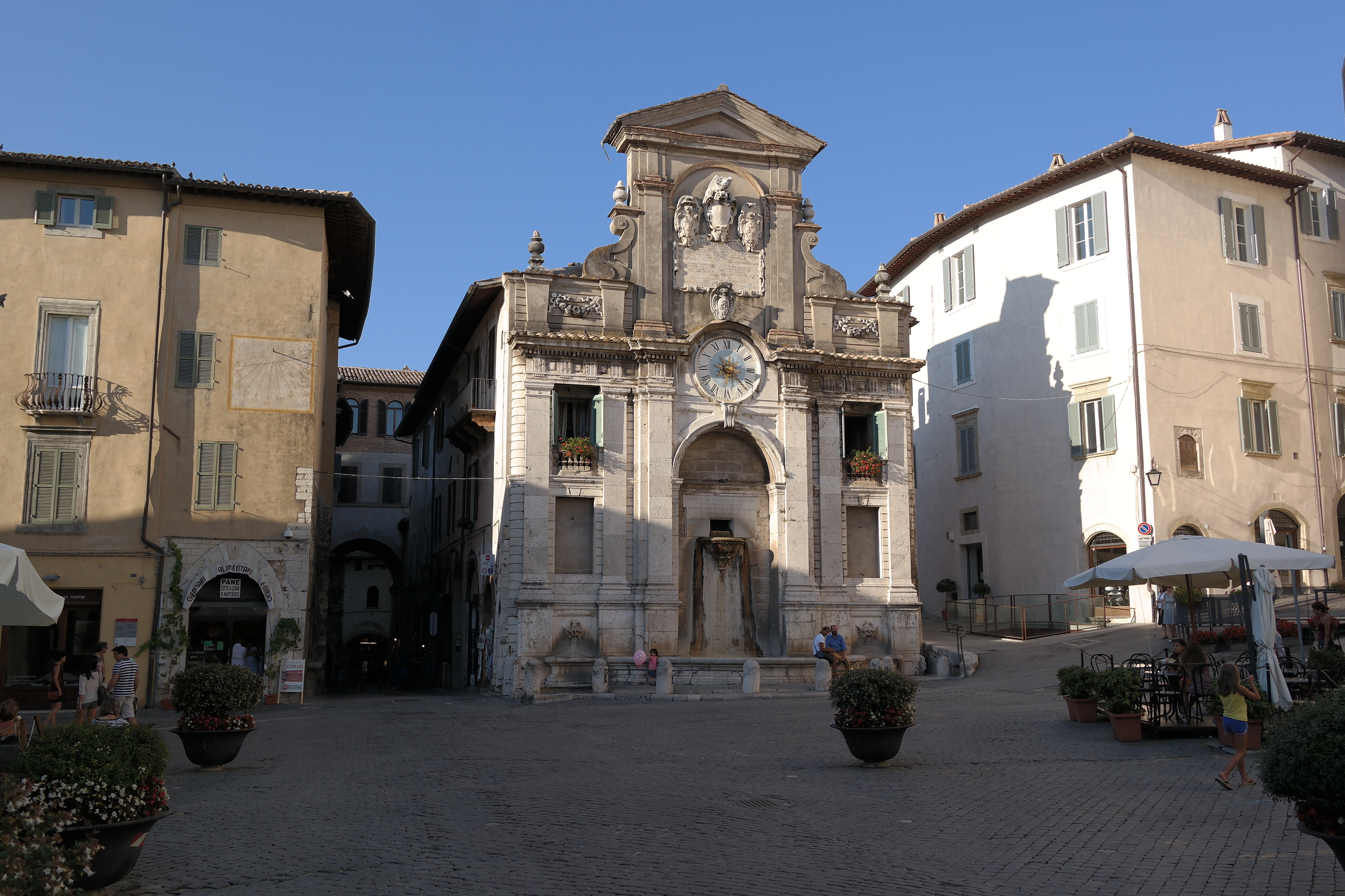 Piazza del Mercato a Spoleto, con la Fonte di Piazza